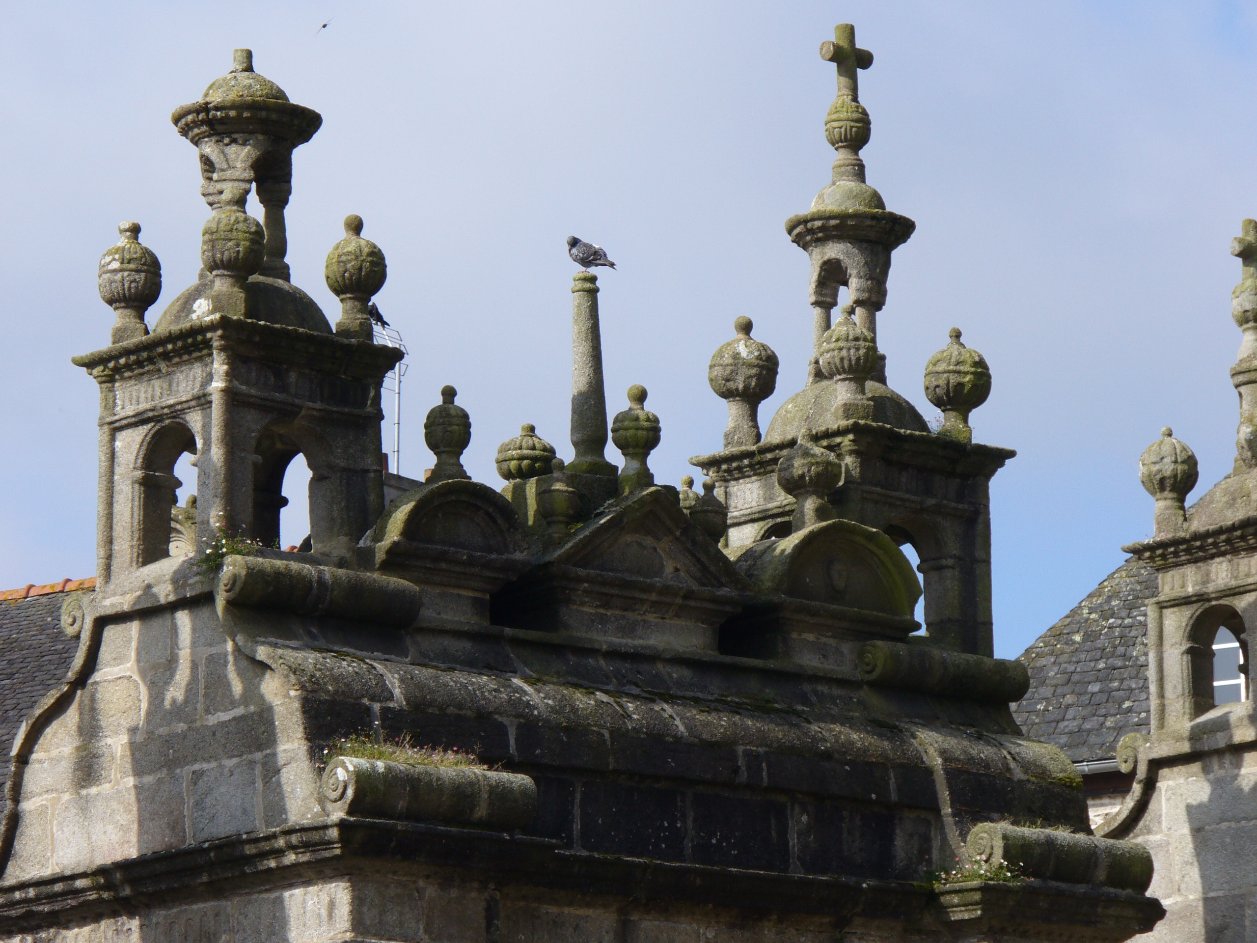 Triumphpforte von Saint Thégonnec(Porte de Triomphe-1587) - Symbol des Zutritts der Gerechten in den Himmel u.zeigt den Gäubigen das sie geweihten Boden betreten.